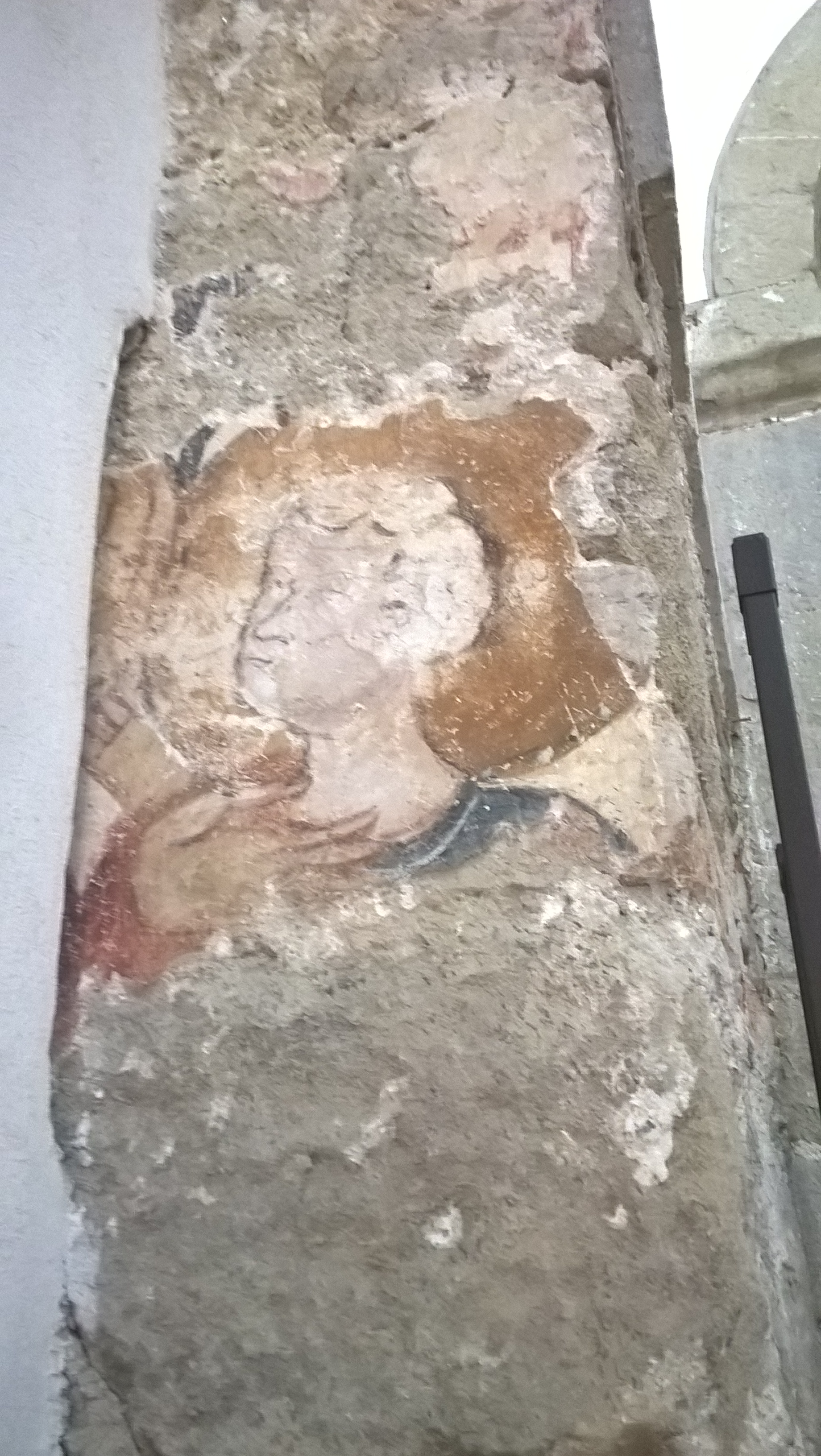 Particolare affreschi chiesa matrice